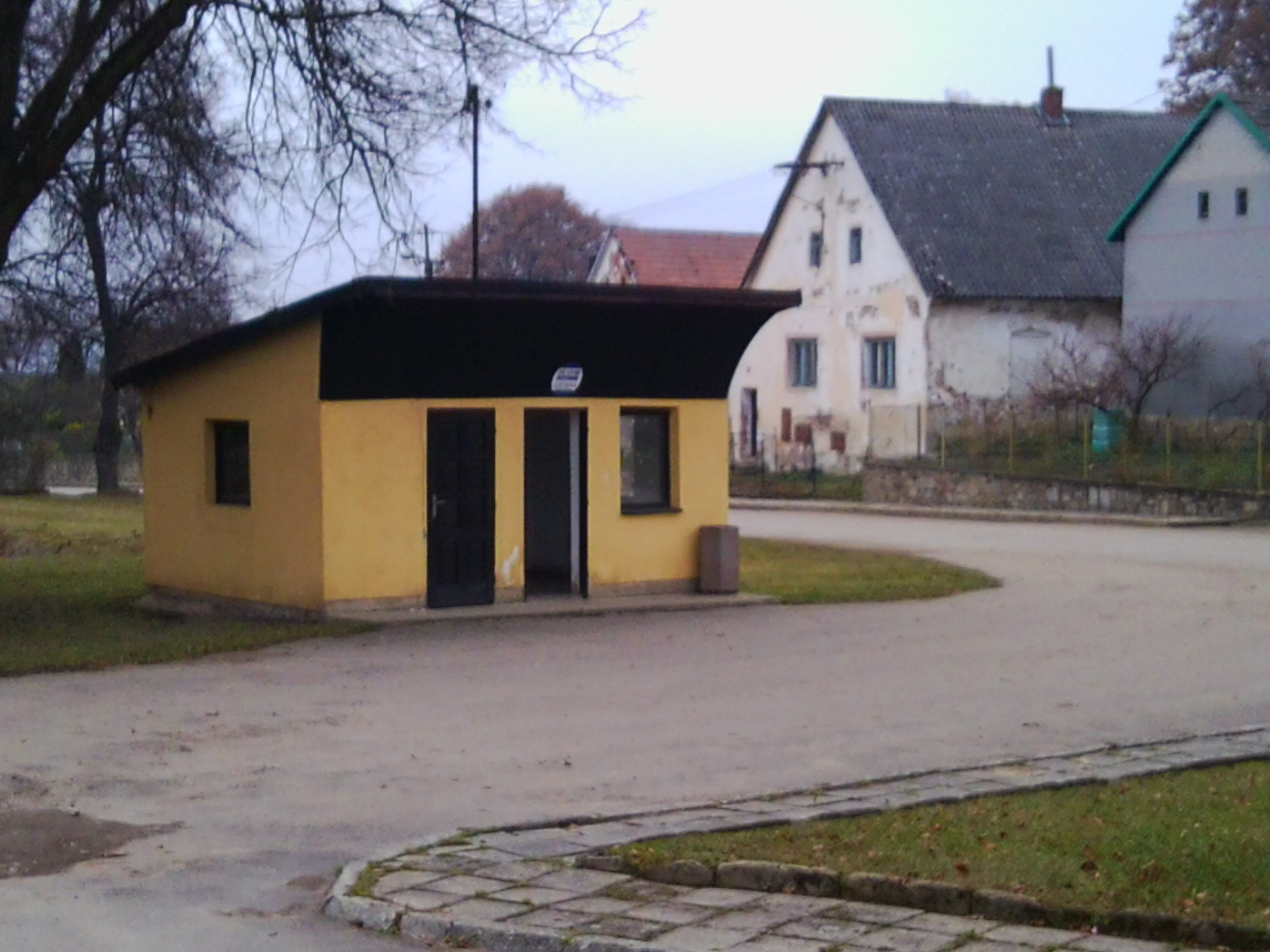 autobusová zastávka